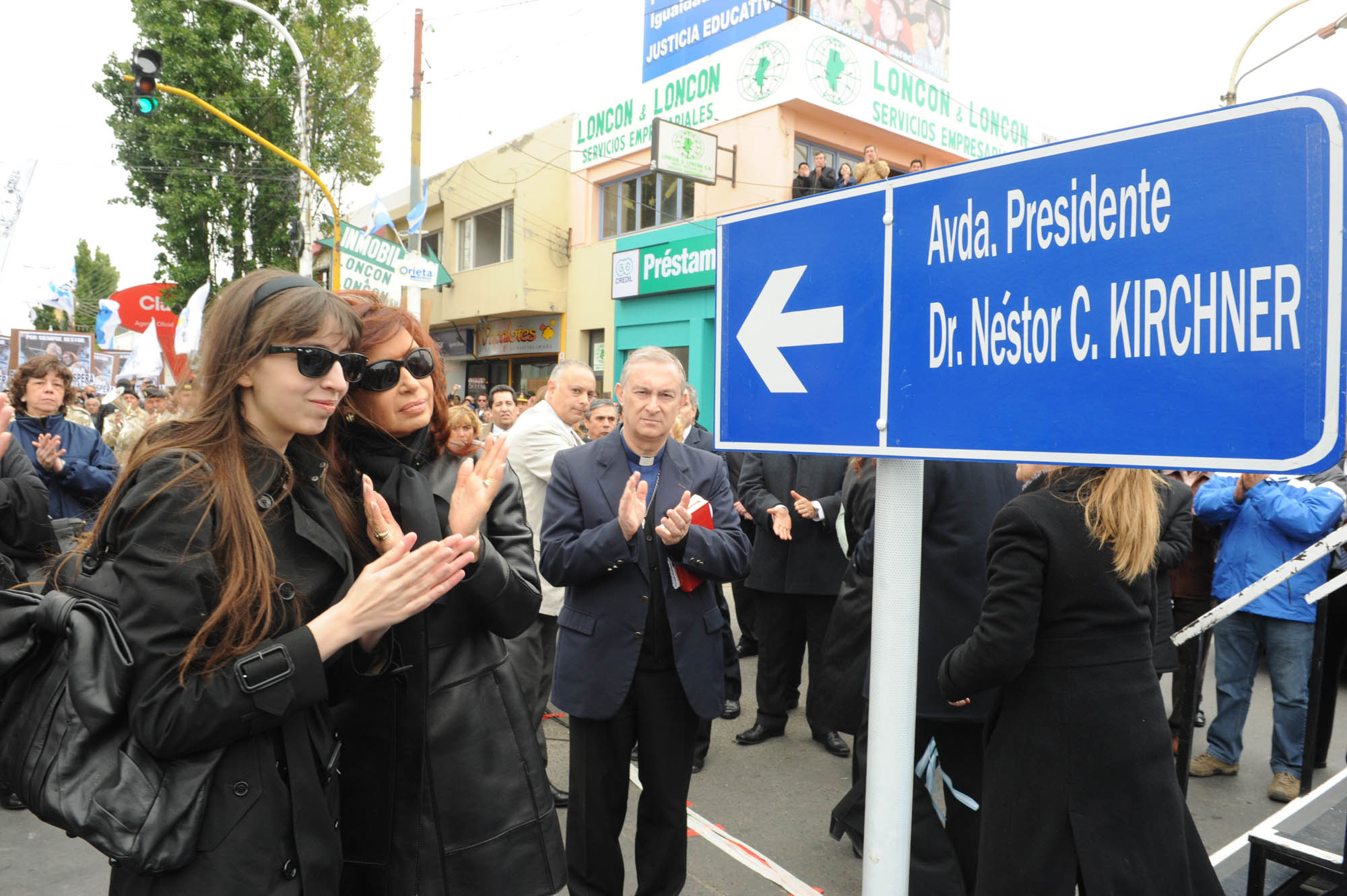 Cristina Fernández observa un cartel indicando el nombre de una avenida en Río Gallegos, la cual se le impuso el nombre de su esposo "Avenida Presidente Dr. Néstor C. Kirchner".